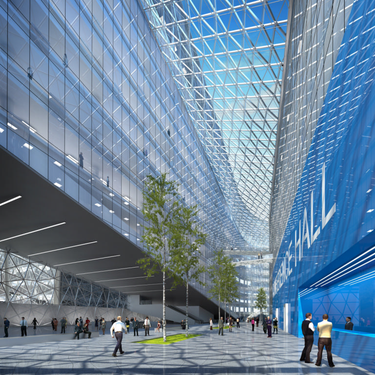 визуализации проекта Лахта-центр